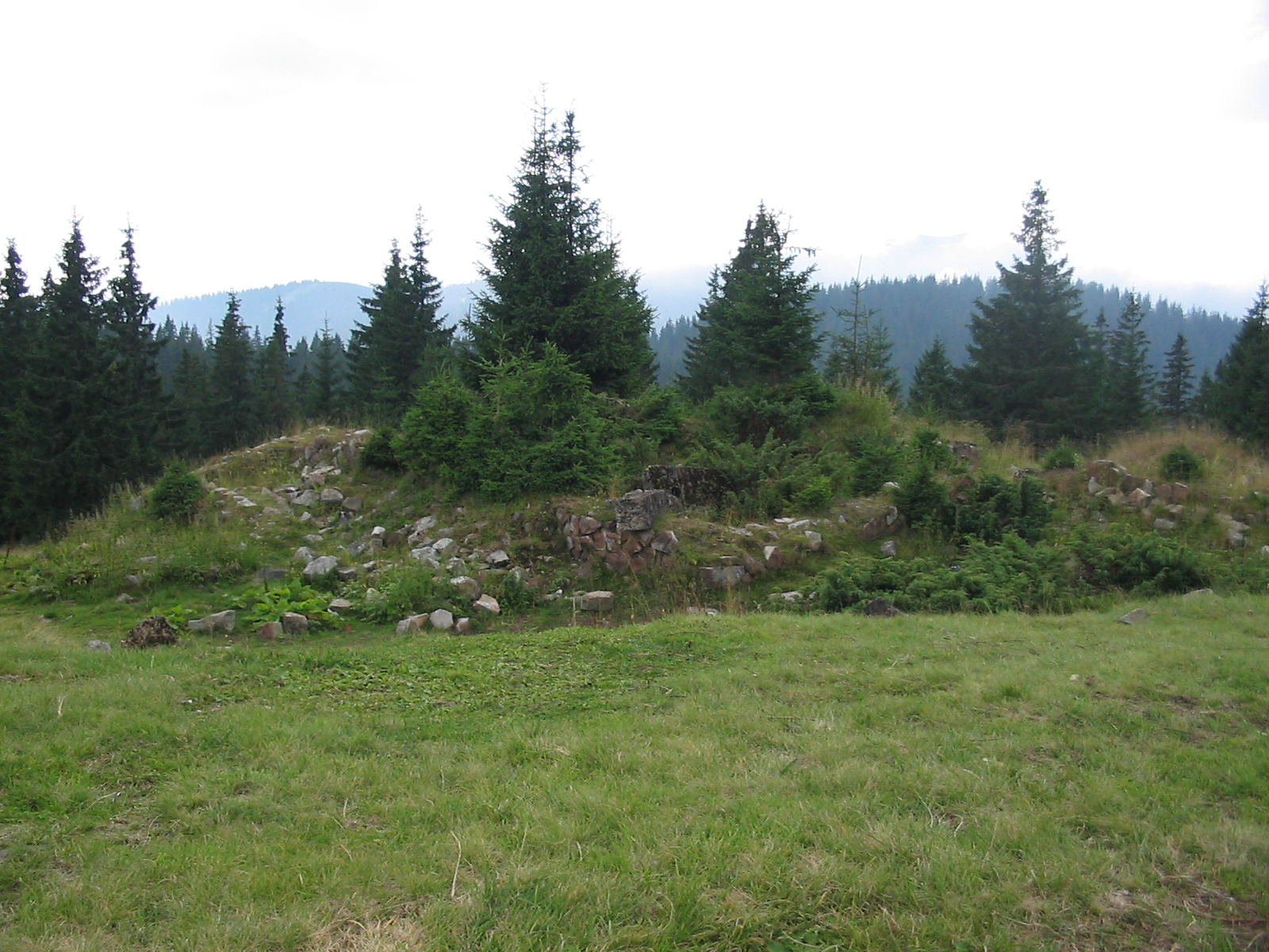 Станом на серпень 2005 р.